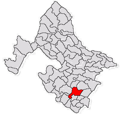 Categorie:Hărţi ale judeţului Mehedinţi